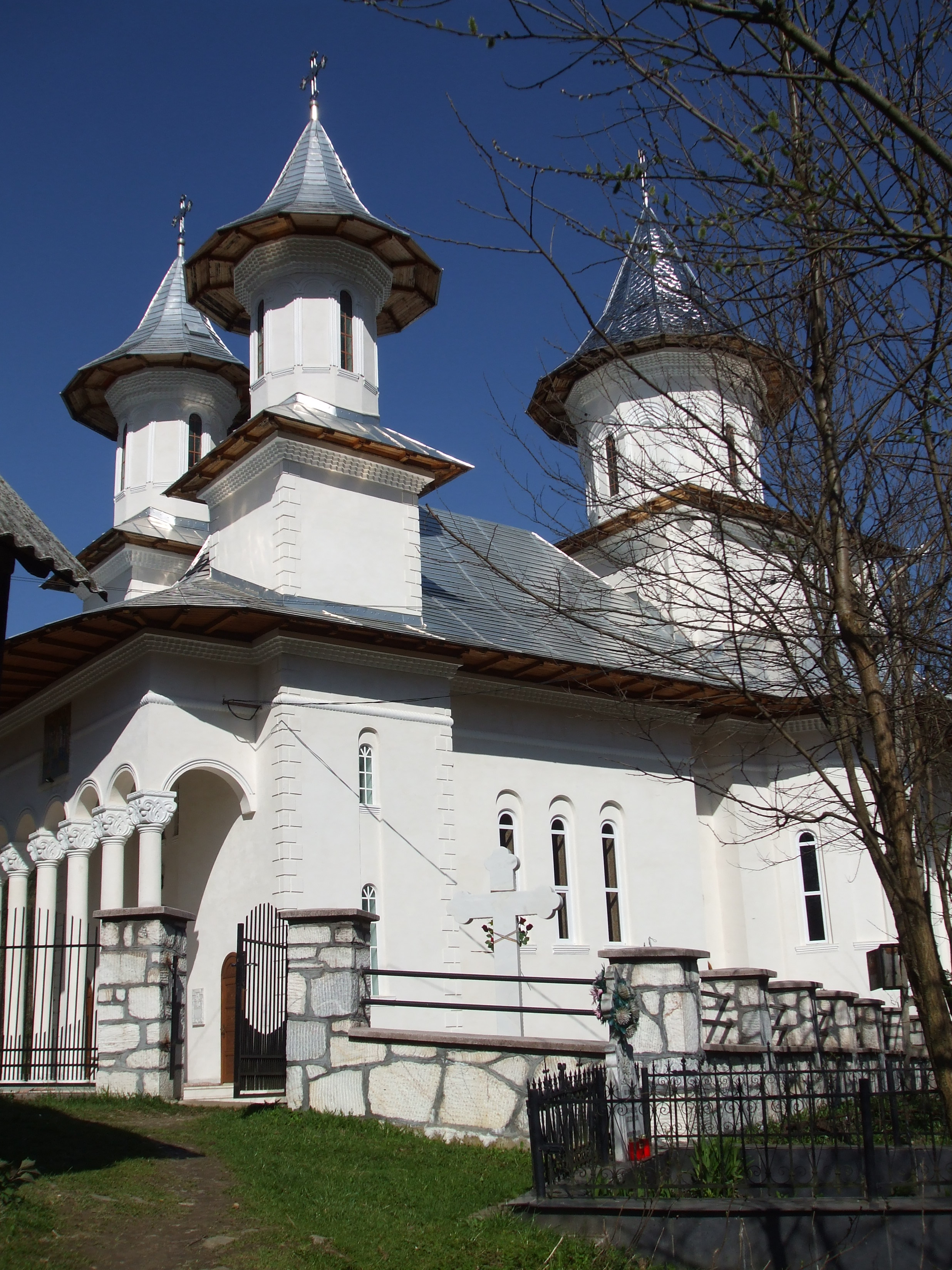 Noua Biserică din comuna Horea ,jud.Alba - sfinţită în 4 iulie 2007.